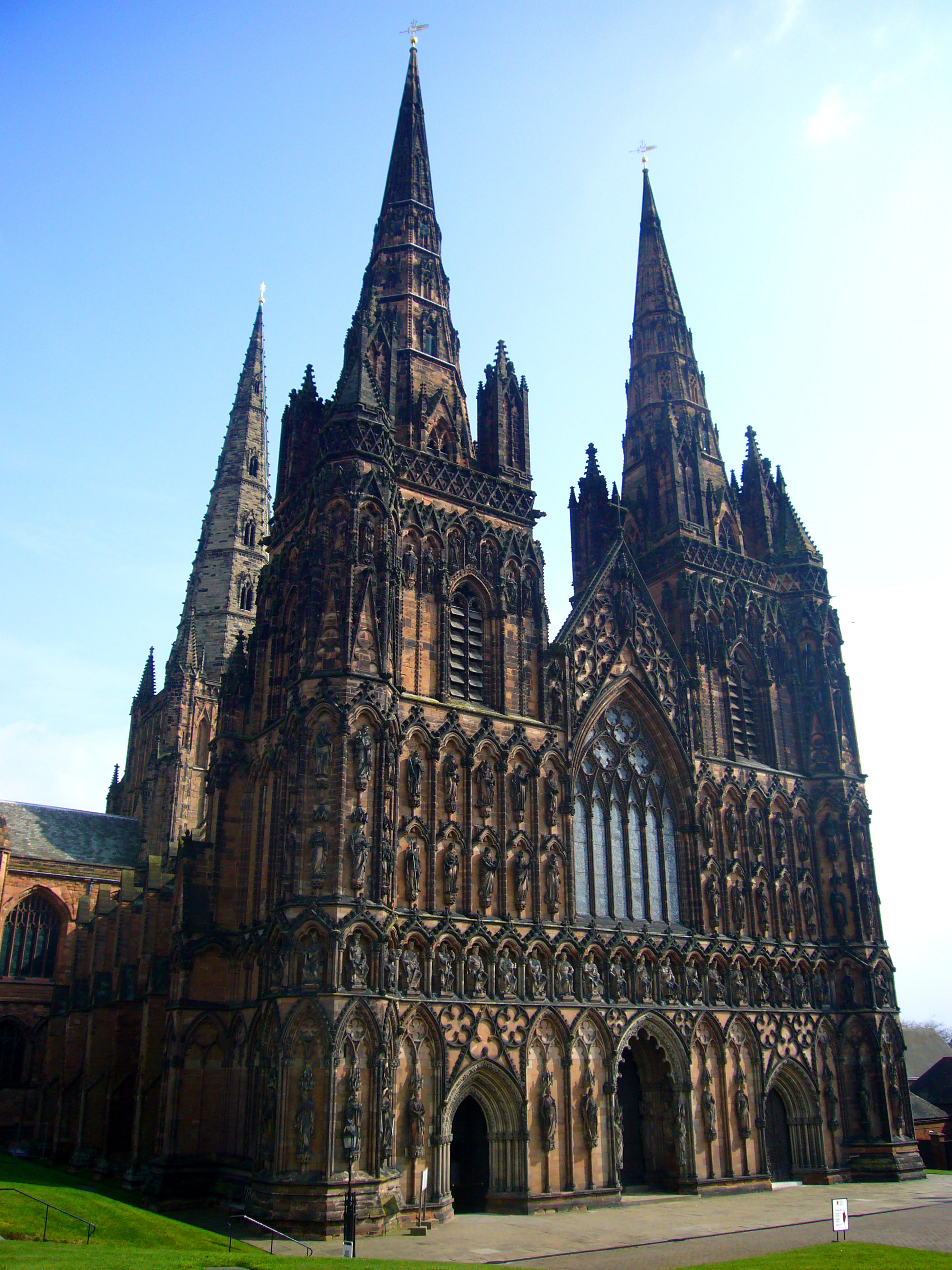 Catedral de Lichfield.